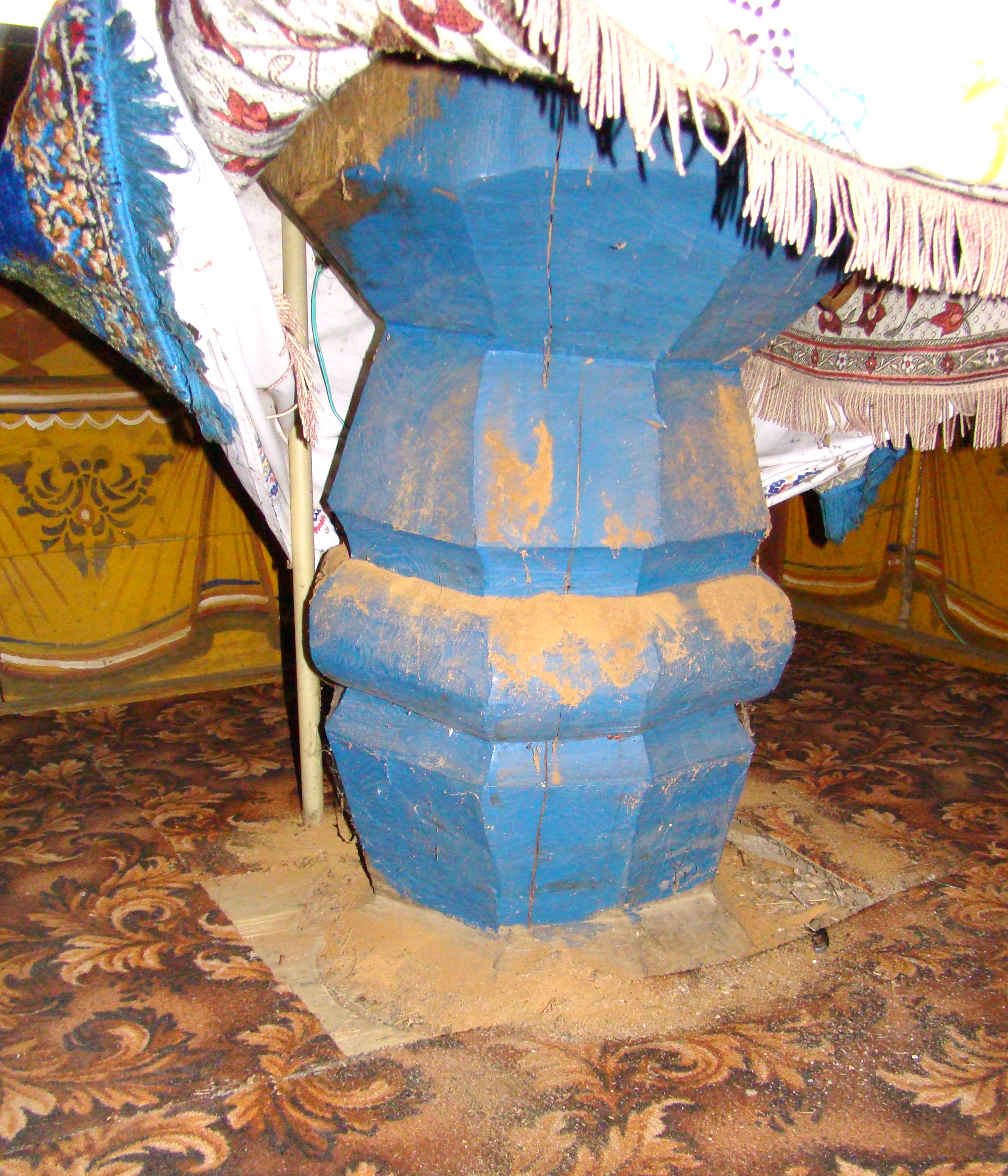 Biserica de lemn "Sfinții Arhangheli Mihail și Gavriil" din Chichișa, comuna Românași, judeţul Sălaj